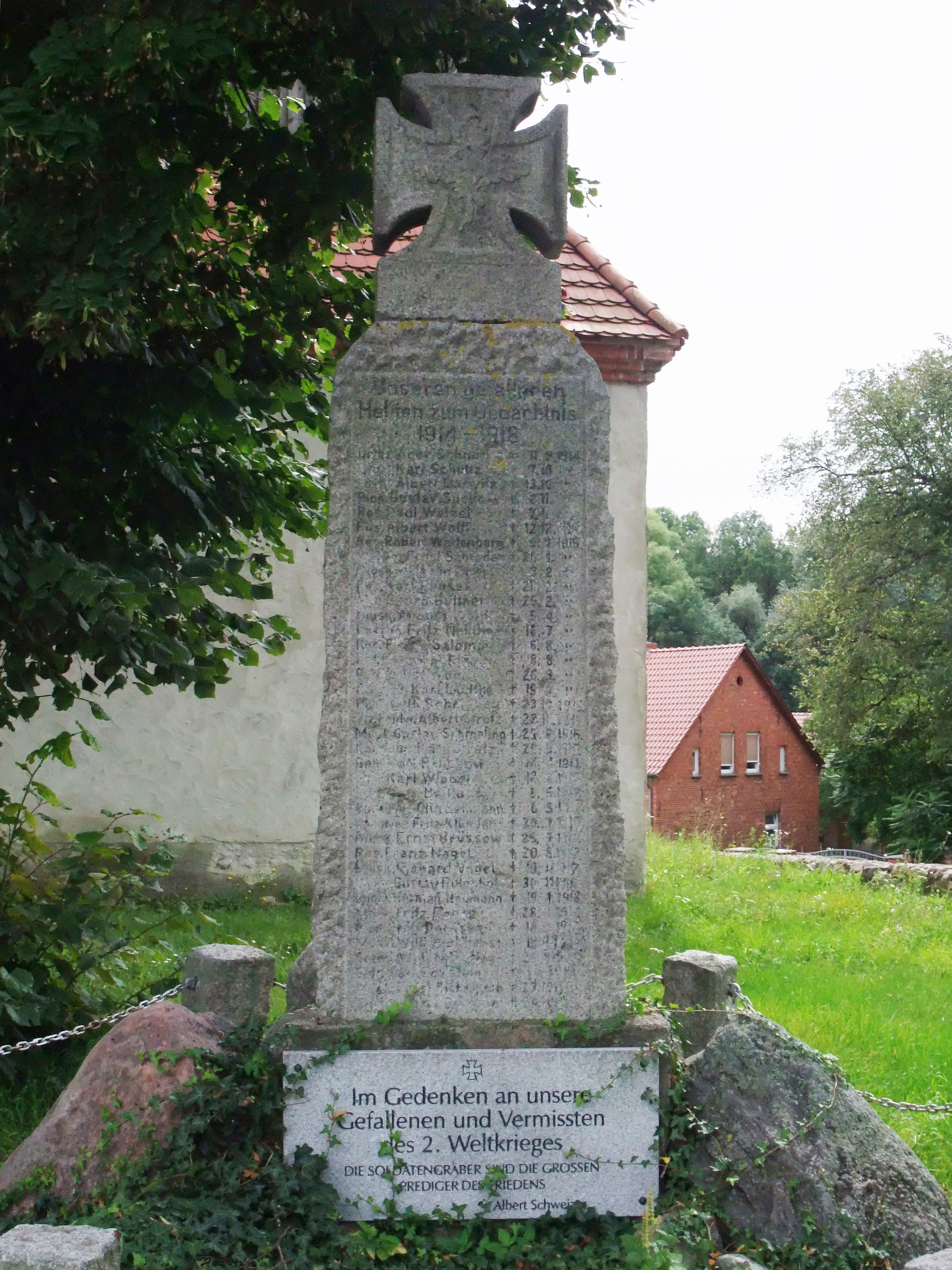 Gedenkstein / tafel neben der Kirche in Mescherin ( Uckermark , Brandenburg ). Weltkrieg .